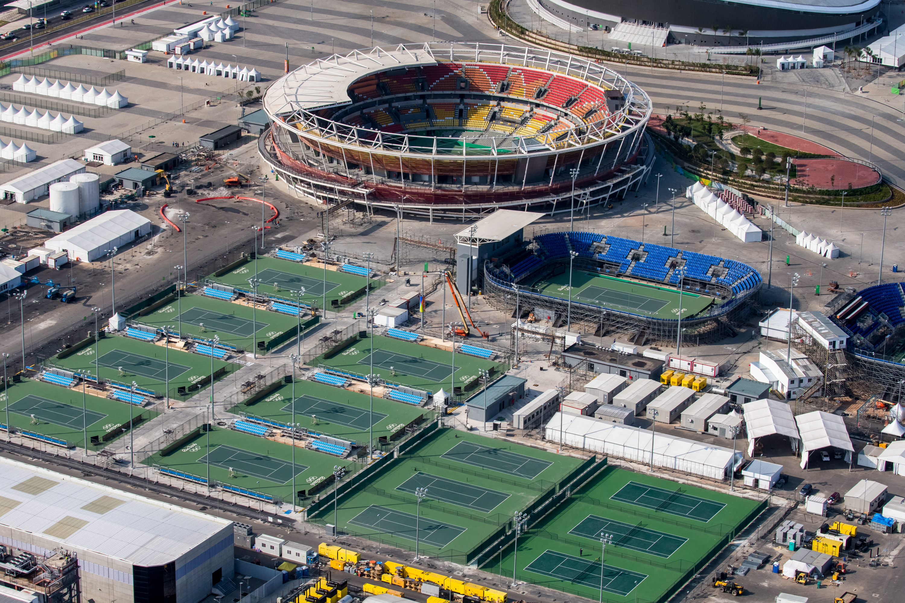 Visão geral do Centro Olímpico de Tênis, no Parque Olímpico da Barra.